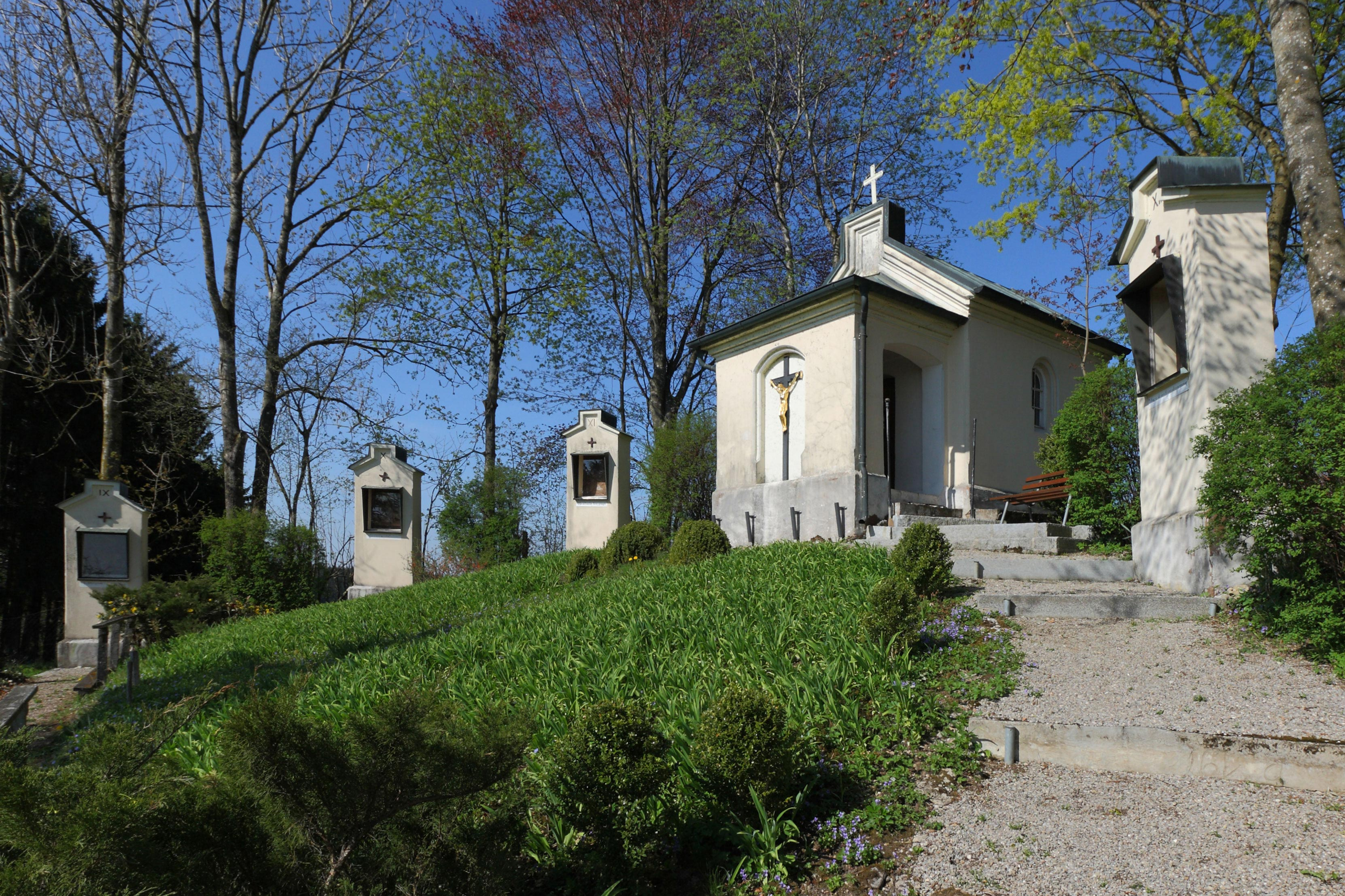 Kalvarienberg Memmenhausen; Teil der Anlage von insgesamt 13 gemauerten Bildstöcken, die ursprünglich 1750 errichtet und 1871 neu erbaut wurde. Die Nischen enthalten Kreuzwegbilder, Öl auf Blech, 1871 von Joseph Mangold in Unterpeißenberg geschaffen. Im oberen Scheitel der Anlage befindet sich eine kleine Kapelle